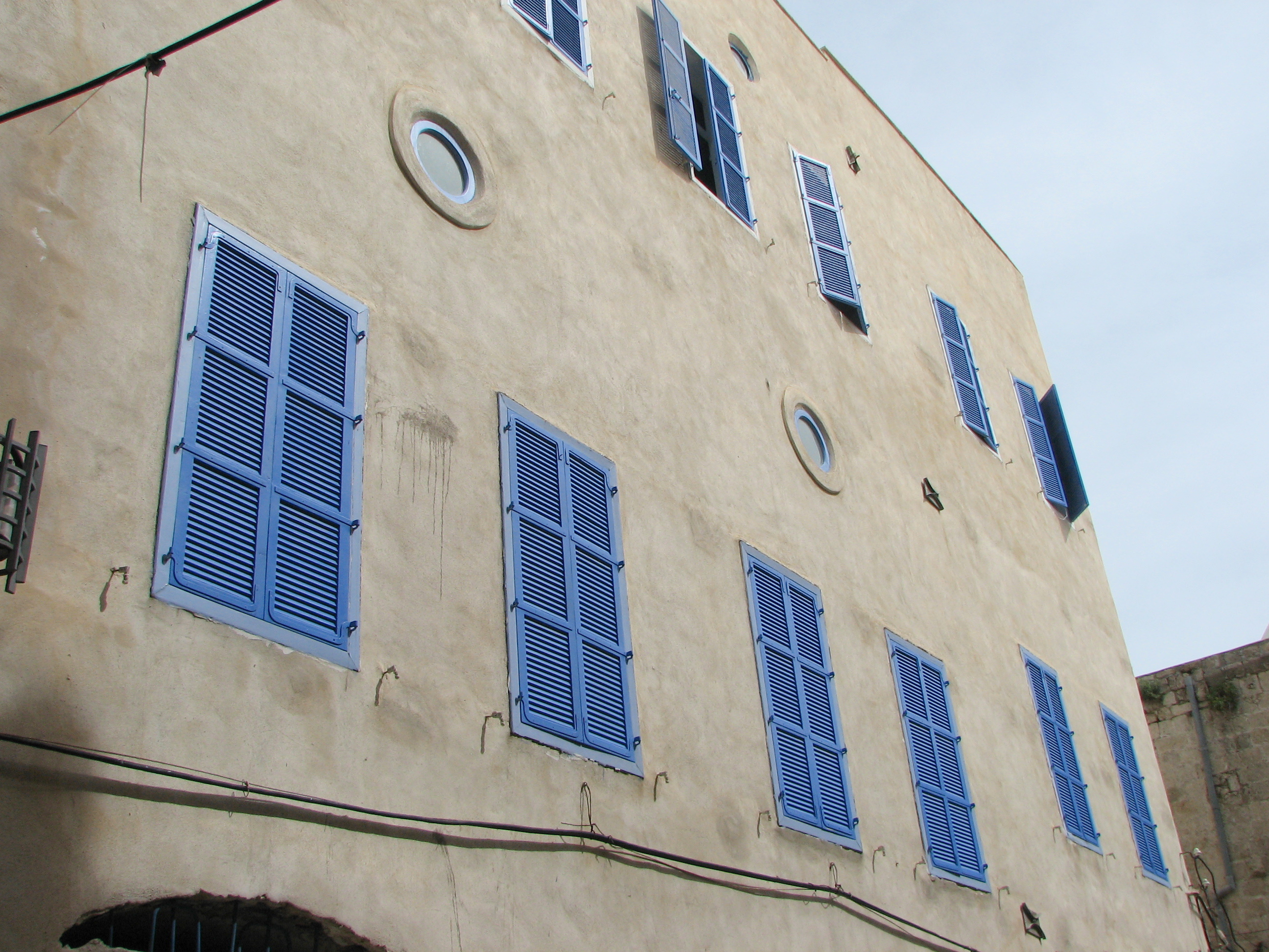 Akko, El Shazliya Mosque under construction. The cost of construction is estimate 80 M $ מסגד אל -שאזליה בעכו. מרכז השאזלים נמצא בלבנון. במשך שנים מרכז זה נזנח והשוכרים הרחיבו את בתיהם. השאזלים החליטו לשפץ אץ המקום הם פינו את הדיירים תוך מתן פיצויים והחלו בשיפוץ האתר הכולל מסגד מבנים וקברים. ההשקעה המוערכת במבנה באתר היא 80 מליון דולר This image was taken as part of the Elef Millim project trip to the Old City of Acco, which was held on Friday, 5th March 2010. To view all images uploaded as pary of the Elef Millim Project הקירות החיצוניים הפונים לרחוב